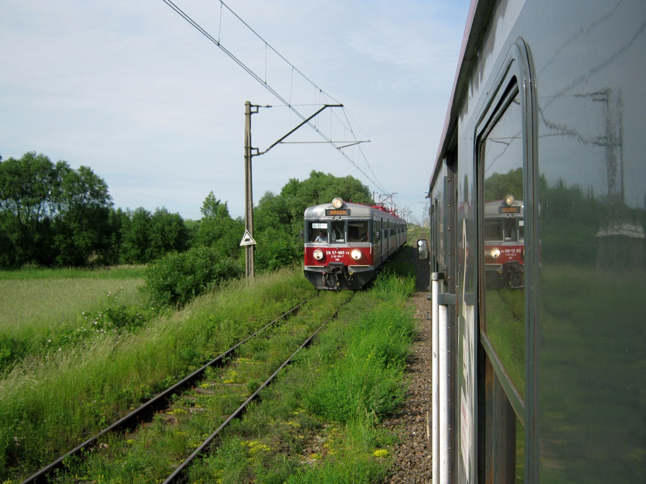 EN57-985 i EN57-1175 mijanka linia 281 (321) odcinek Września- Jarocin